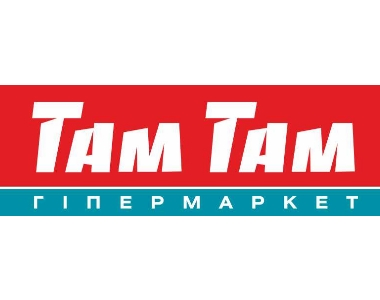 Логотип гіпермаркету «ТАМ ТАМ»